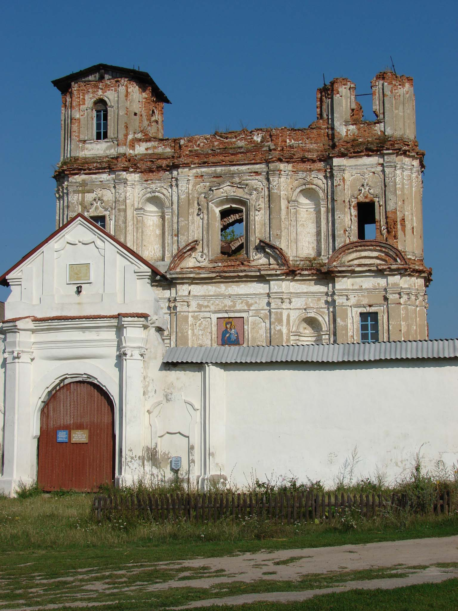 Беларуская (тарашкевіца): Юравіцкі Калегіум Іезуітаў, асабістае фота 2006 года